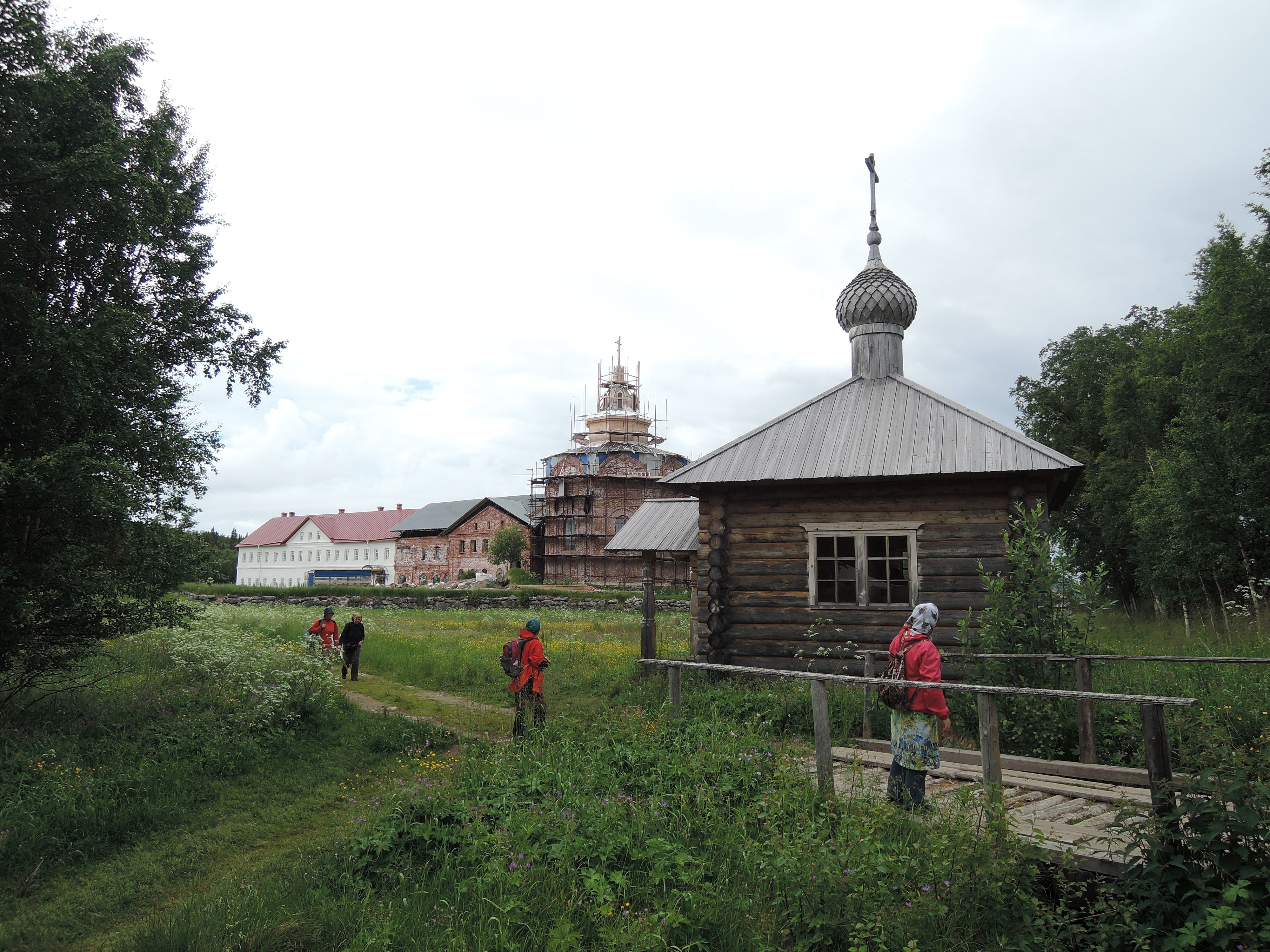 Poustevna sv. Trojice na Anzerském ostrově